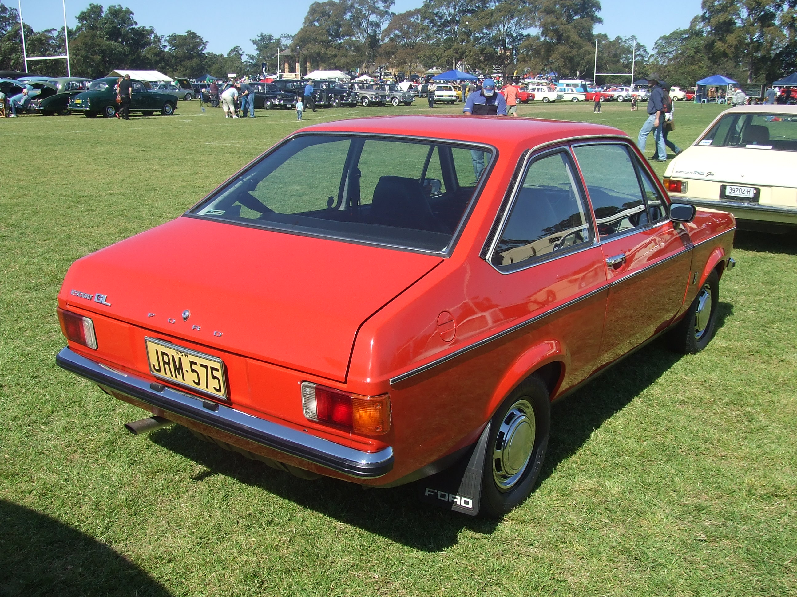 Ford Escort Mk2 GL